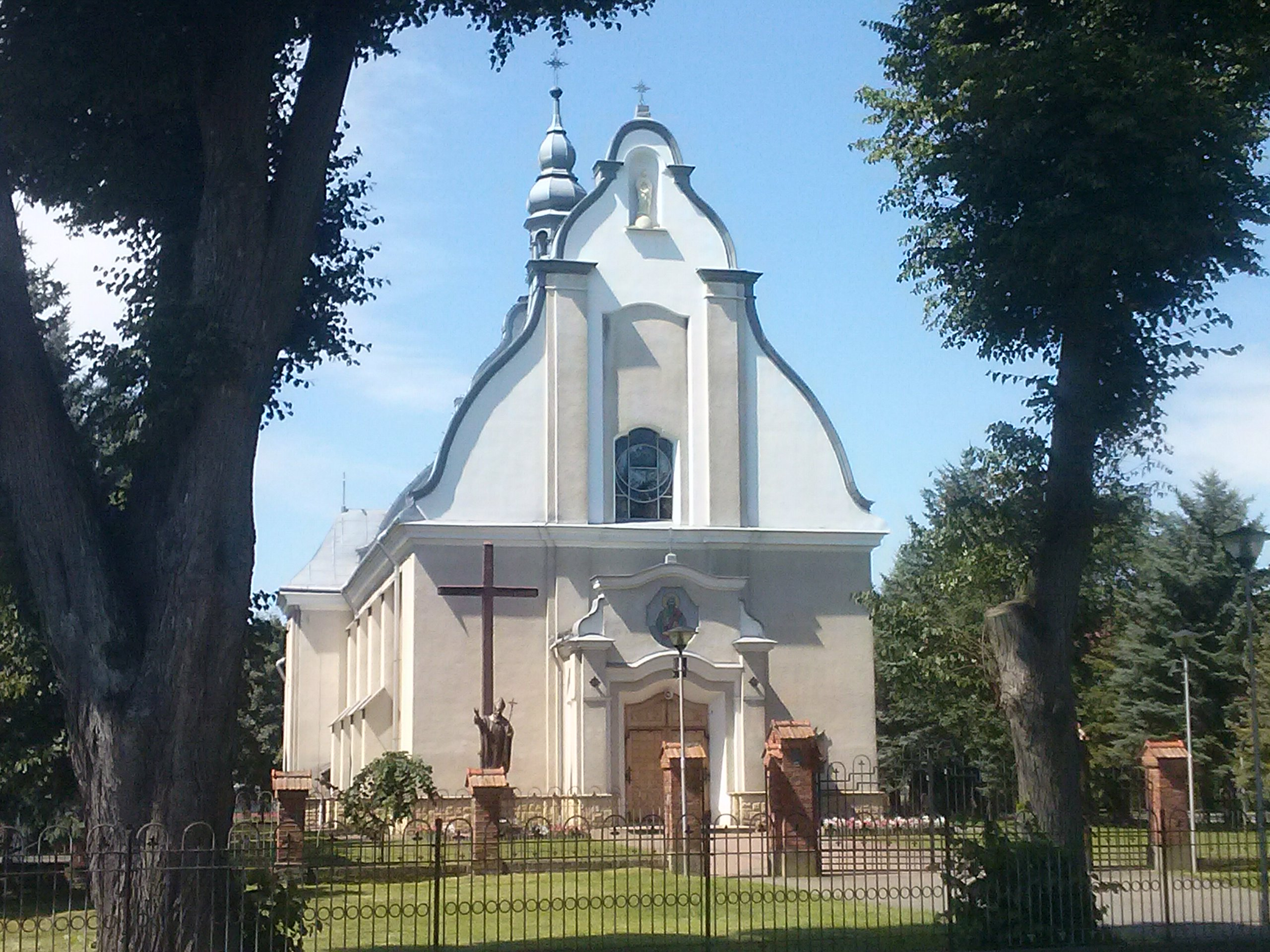 Kościół parafialny w Wiązownicy